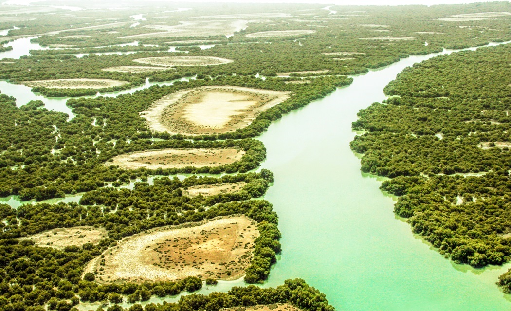 جنگل حرا جنگل های حرا دراستان هرمزگان یکی از جاذبه‌های منحصربفرد و دیدنی کشور بوده و مساحت کل جنگل‌های حرا ۷۵۰۰ هکتار و زیستگاه پرندگان مهاجر هم می‌باشد.